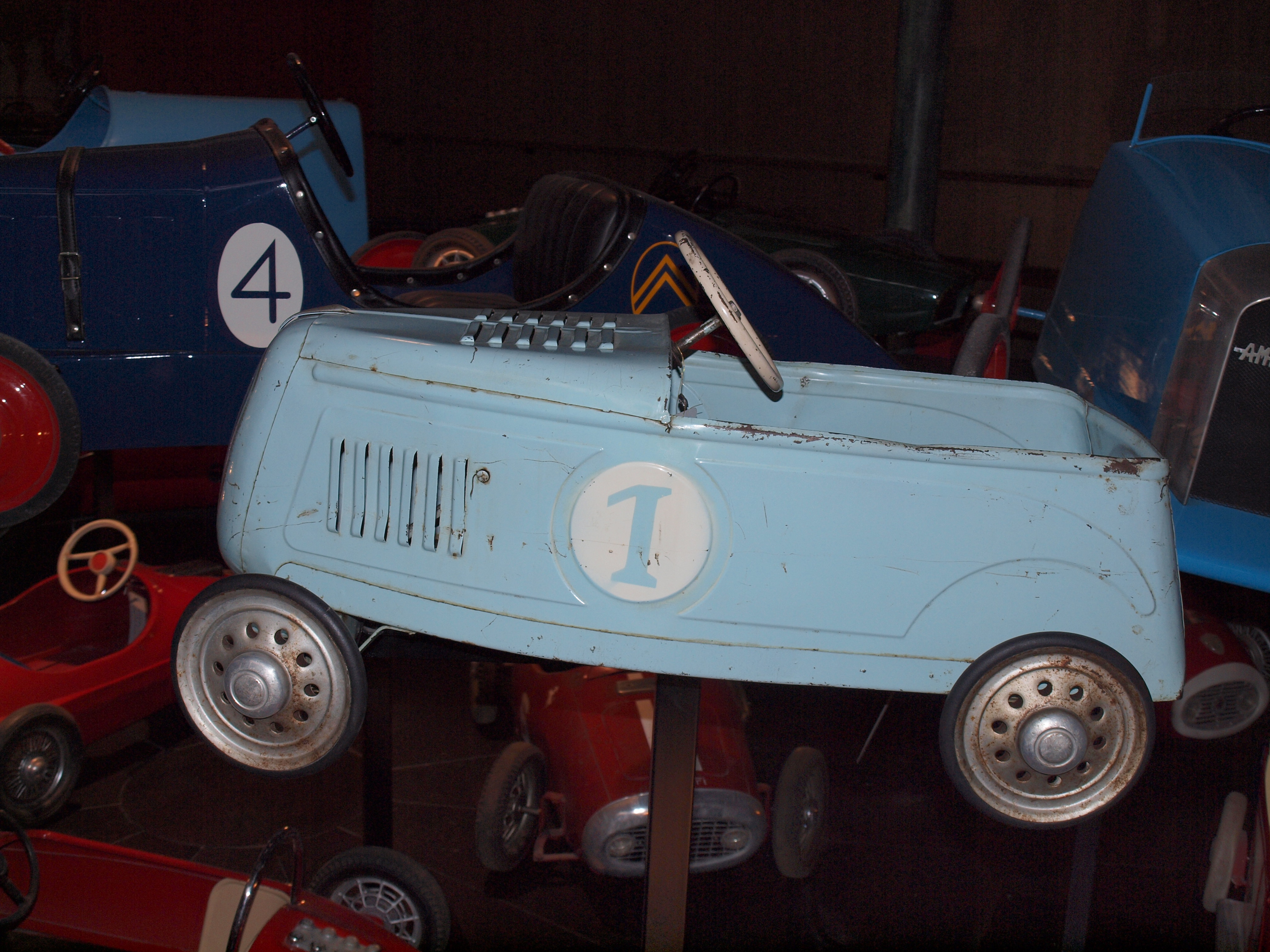 Trapauto